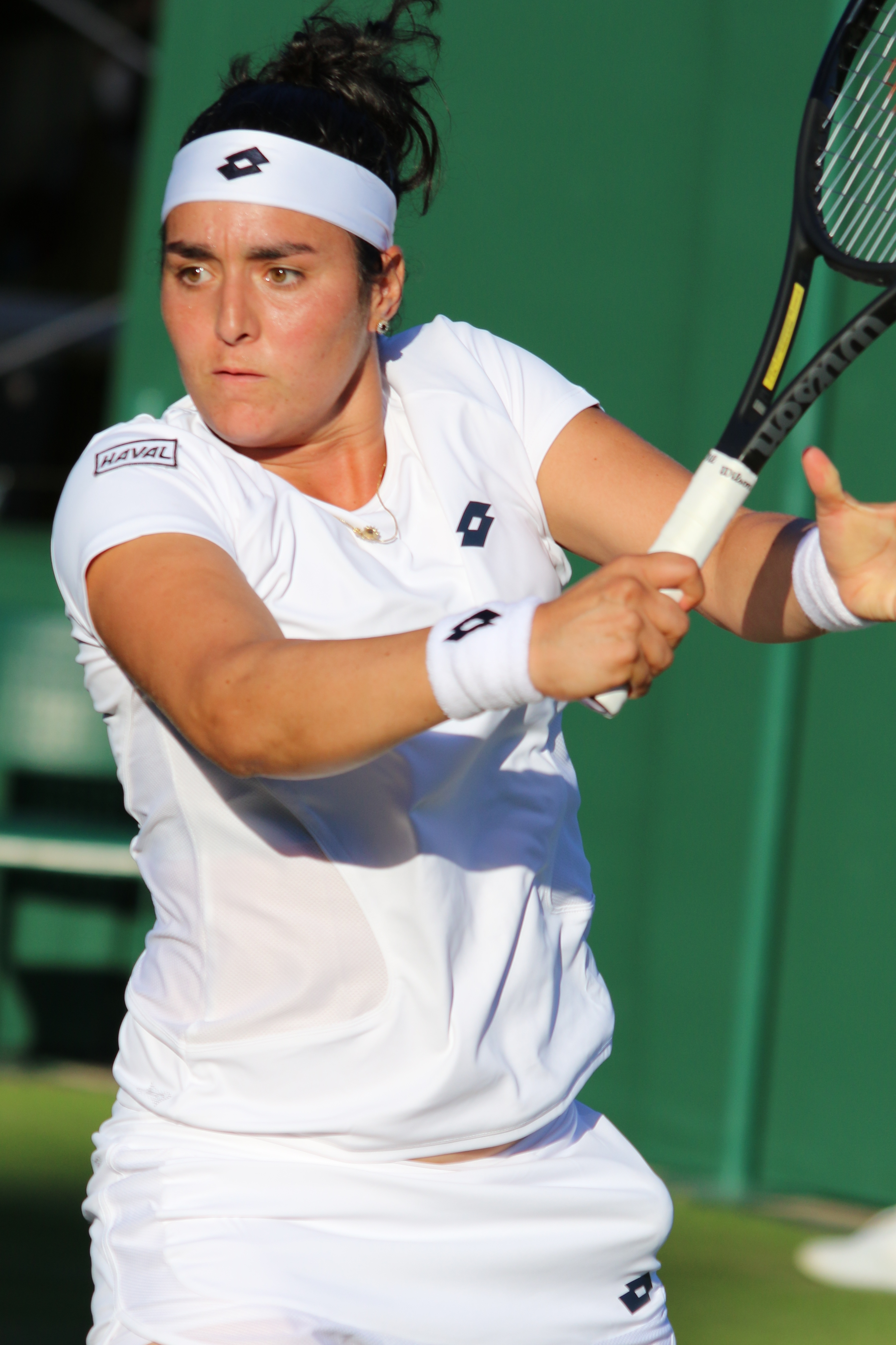 Jabeur WM18 (7)